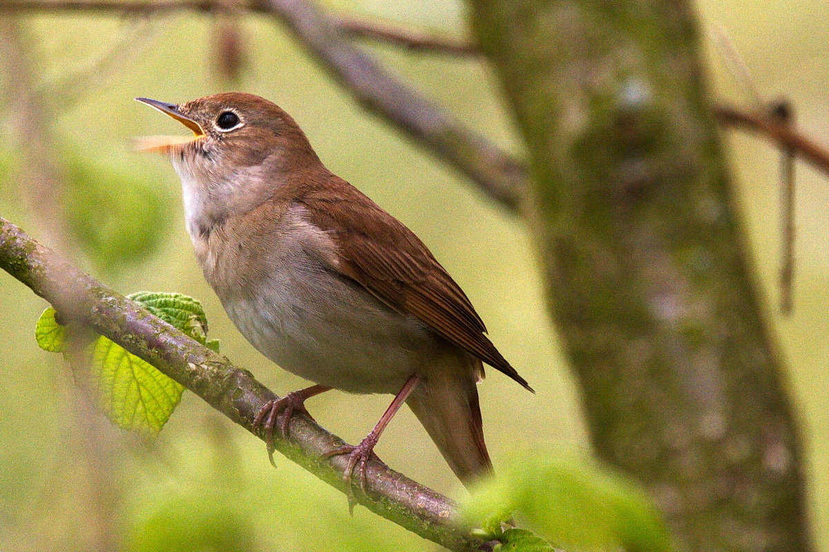 Nachtigall, singend im April, Brutvogel im NSG Bislicher Insel